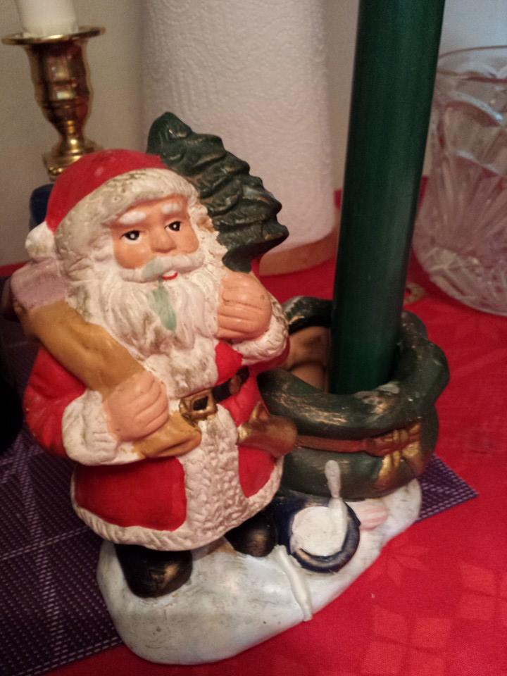 Julemandsfigur.